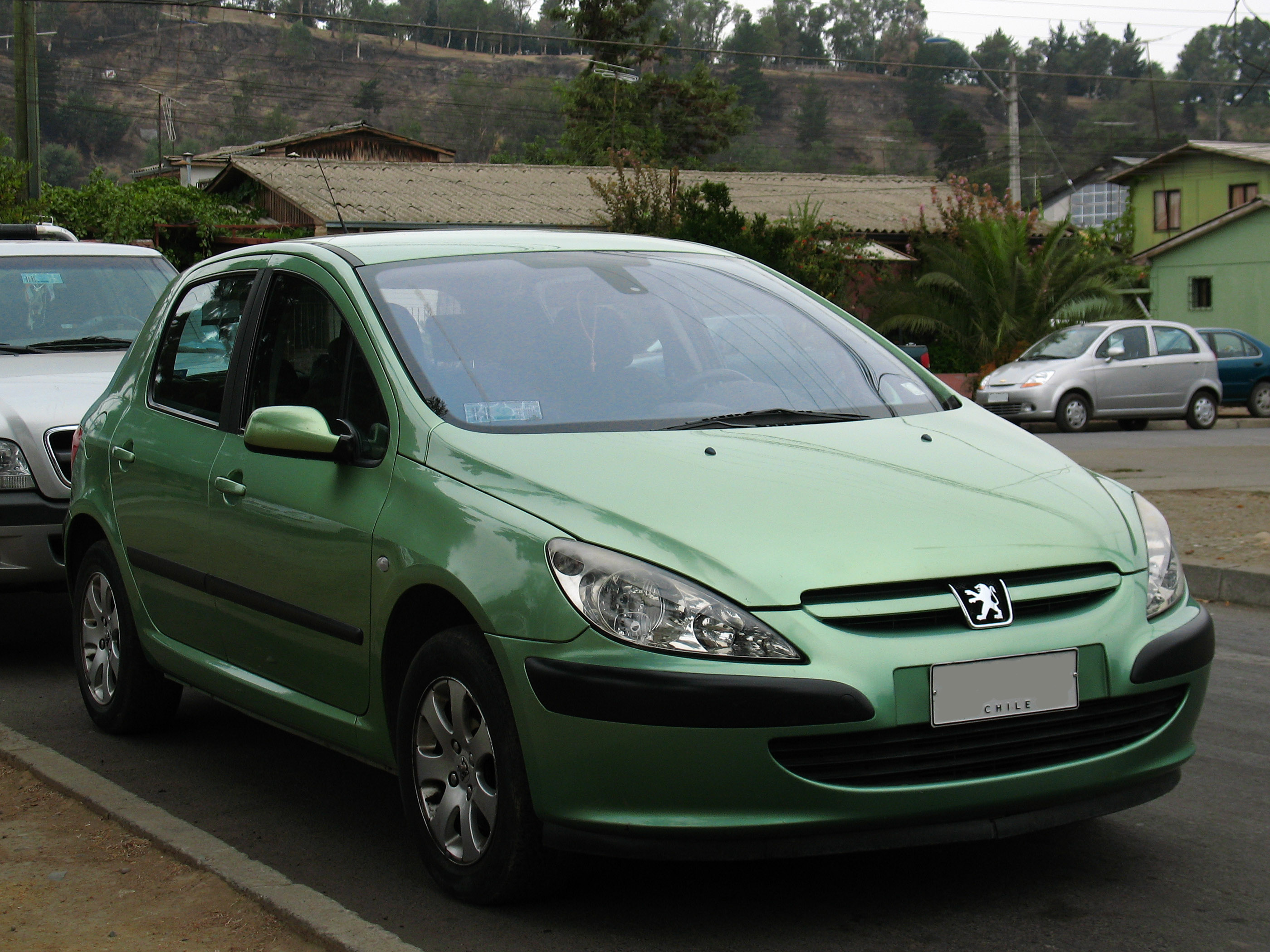 Peugeot 307 2.0 XT 2003